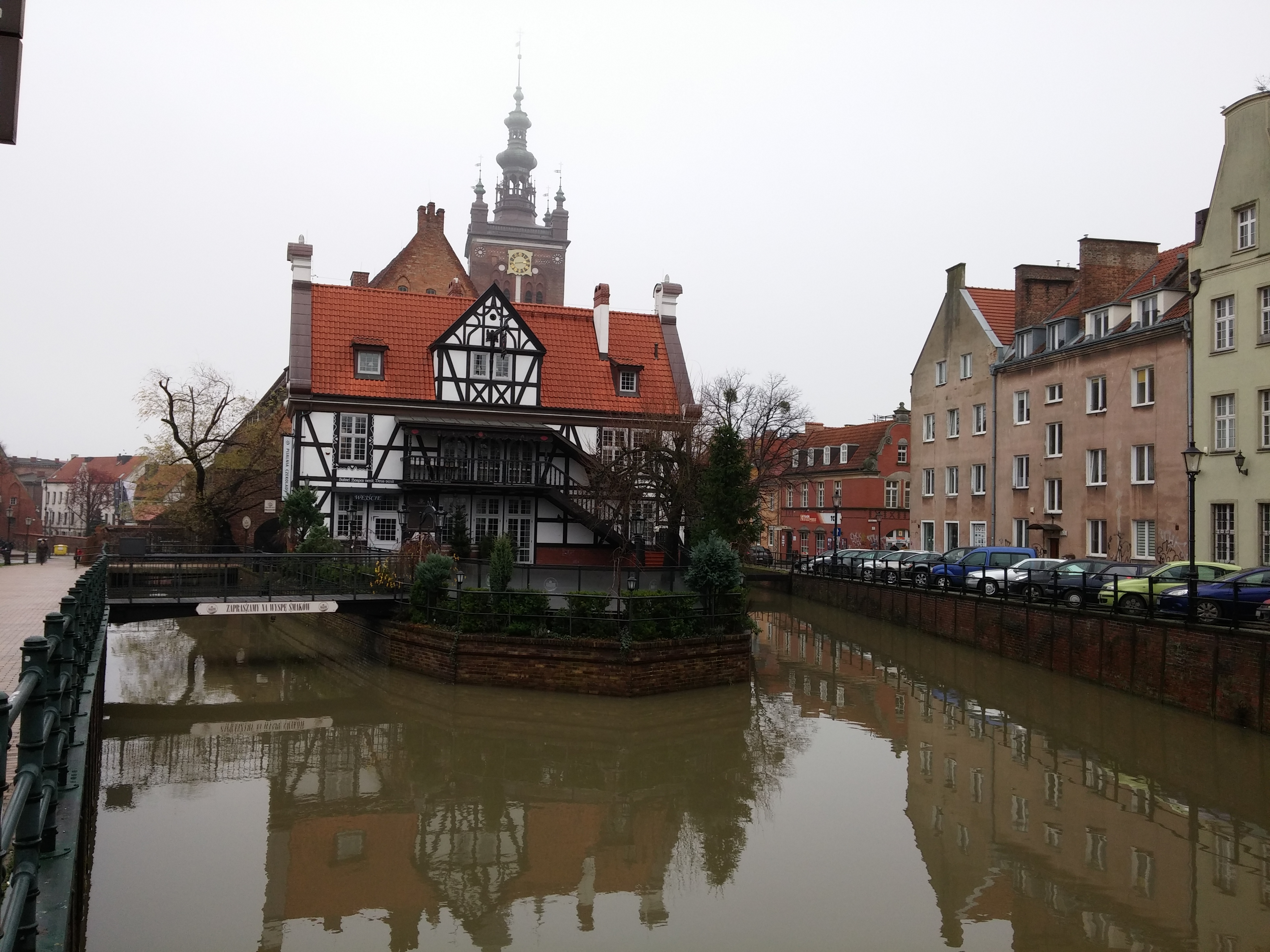 Zdjęcie wykonane na Moście Chlebowym (lub jak kto woli: Moście Miłości lub Moście Zakochanych). Widok na Kanał Raduni.